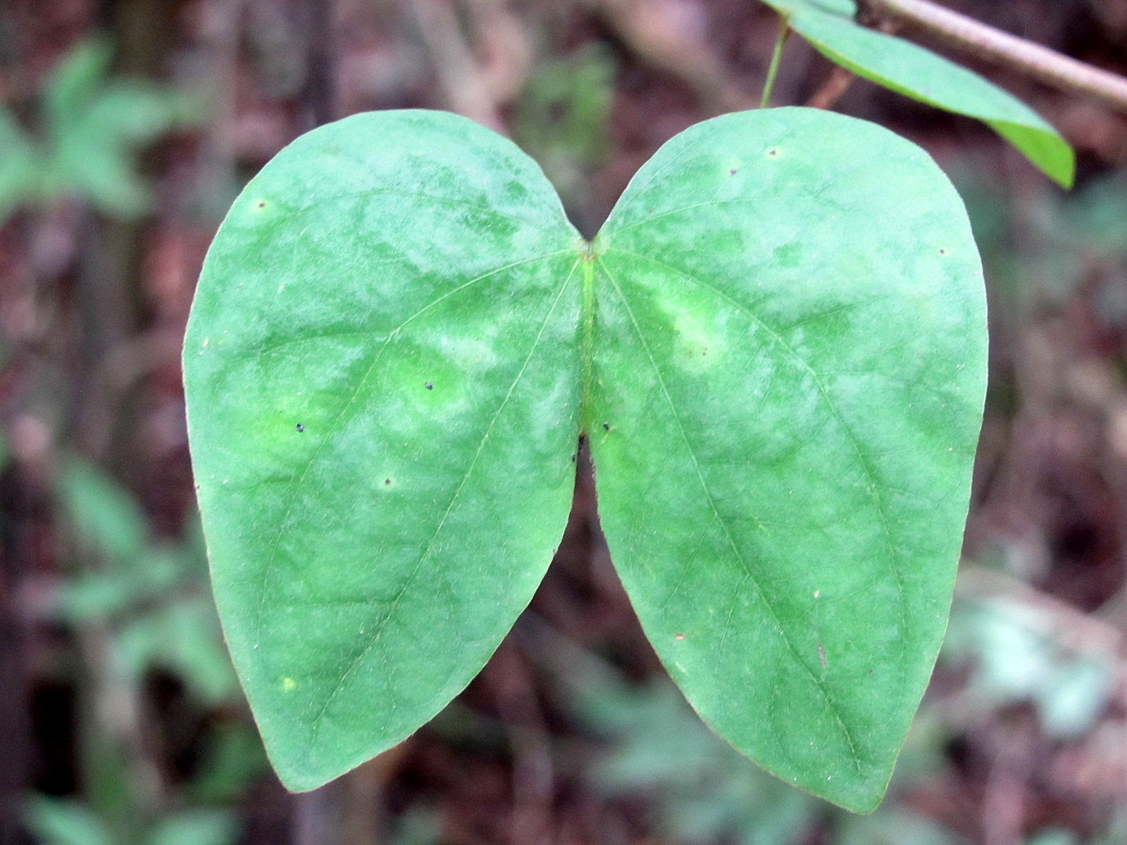 Bauhinia glabra